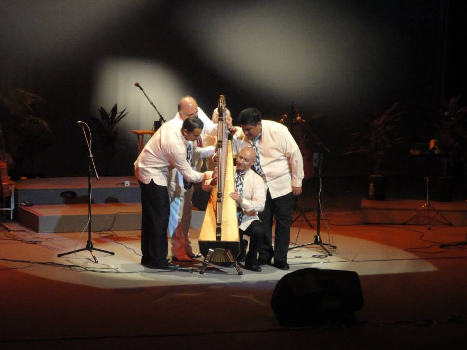 El grupo Tlen-Huicani interpretando "El Balajú" en su concierto del 40 Aniversario.